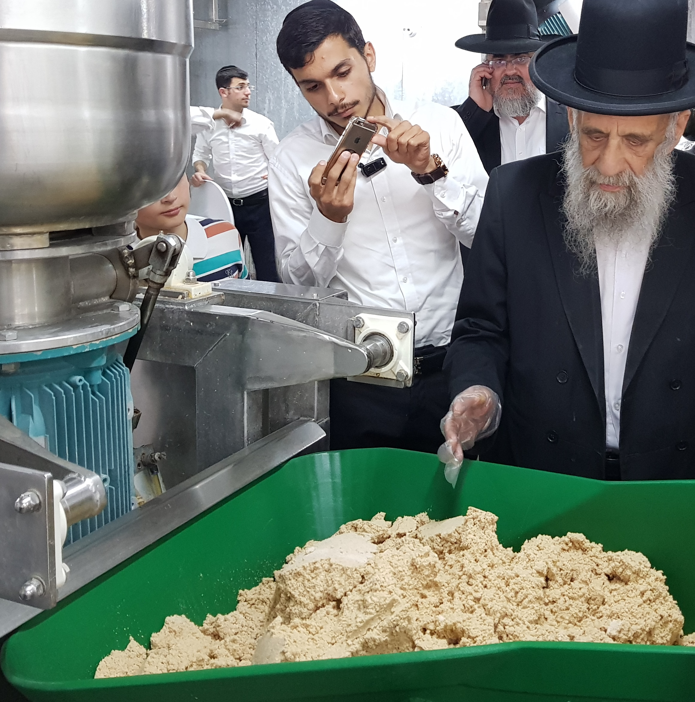 הרב דוד צדקה הרב הראשי לפרדס חנה כרכור בהפרשת חלה, במאפיית מצות יהודה תשע"ח.